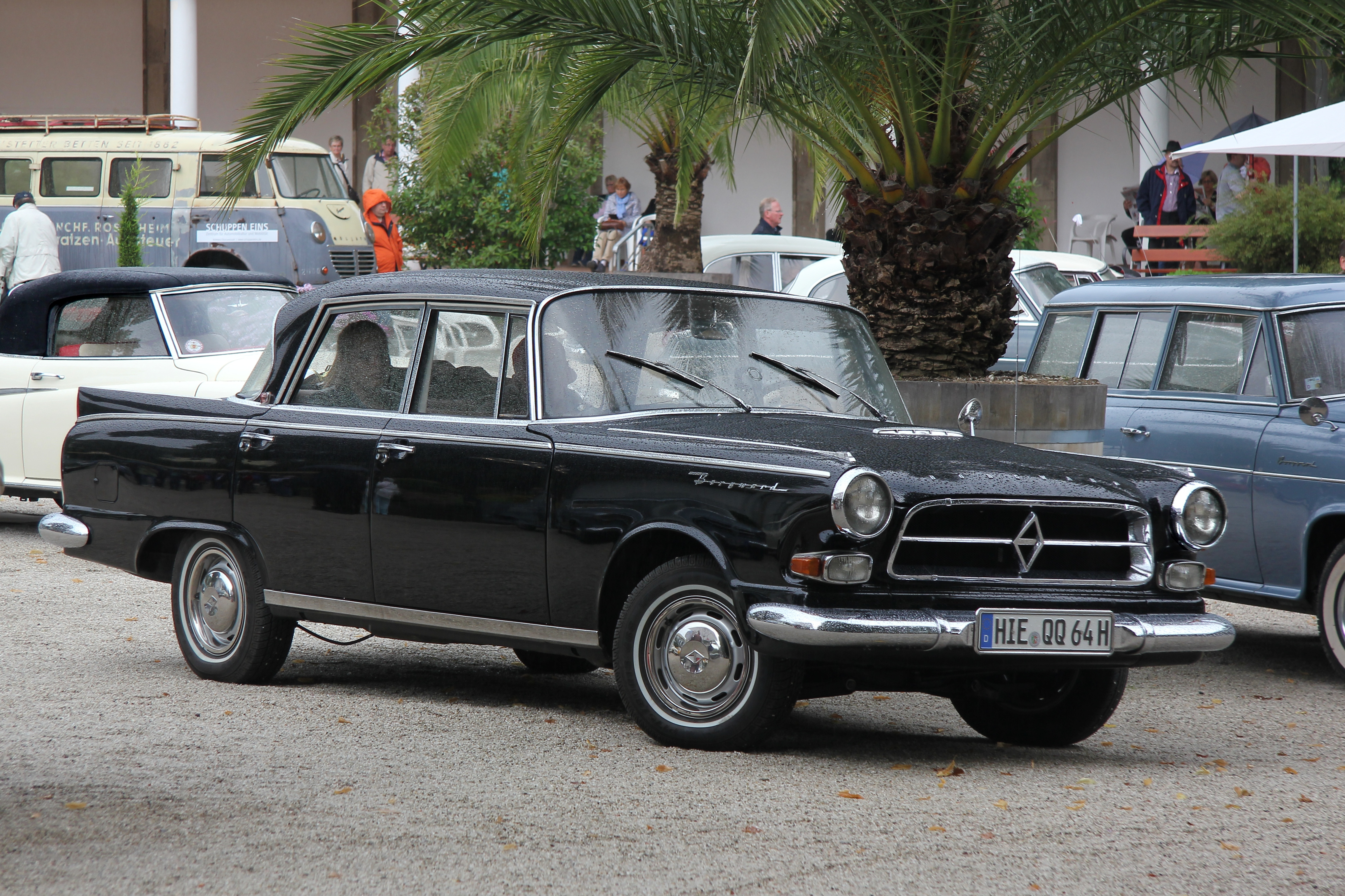 Borgward P 100 oder „Der große Borgward“; 2587 Stück von 1959 bis 1961 gebaut (Kennzeichen des Fahrzeugs verändert)